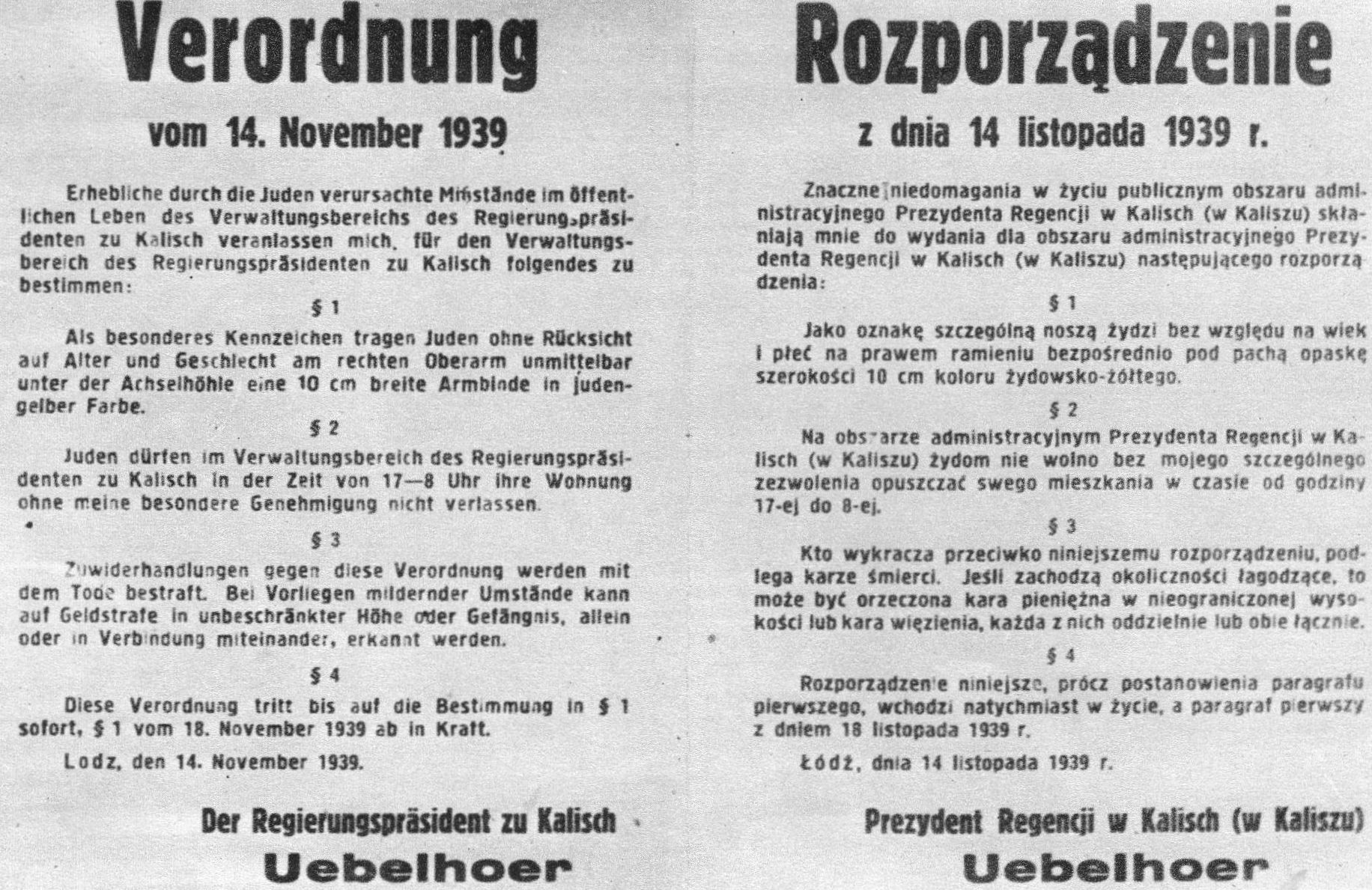 Zarządzanie prezydenta rejencji kaliskiej dotyczące m.in. wprowadzenia znakowania Żydów